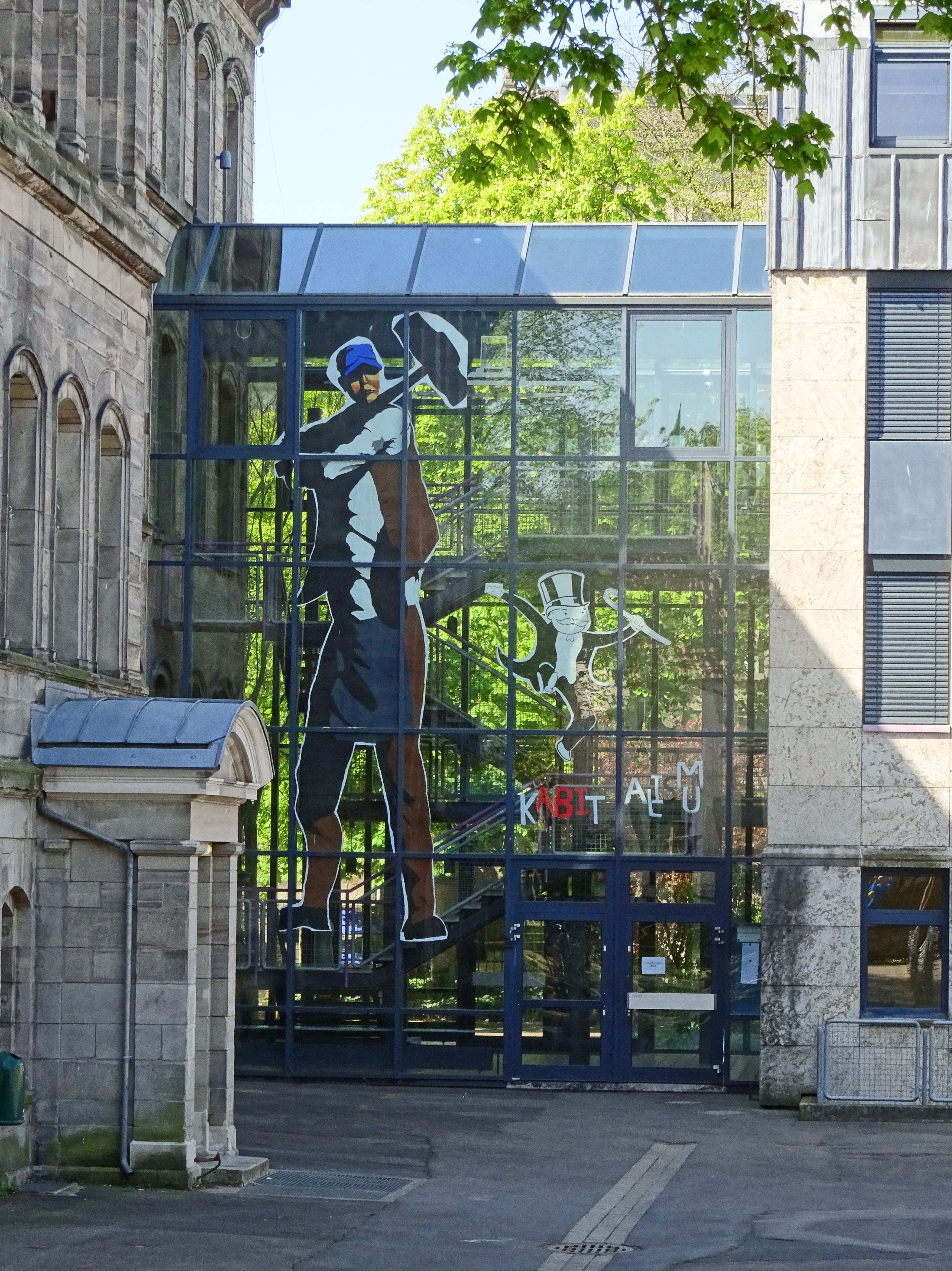 Max-Planck-Gymnasium Göttingen: Übergang Altbau-Neubau